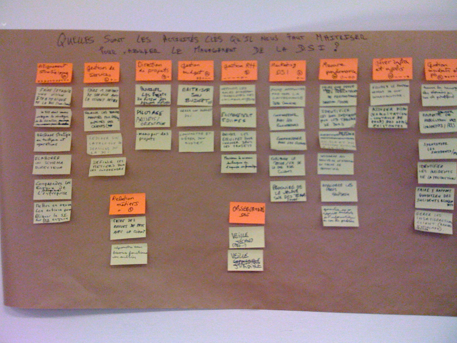 KJ